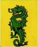 Stendardo del Rione San Michele